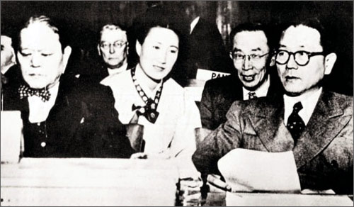 1948.12 파리 UN총회 옵저버 (조병옥, 모윤숙, 장면)